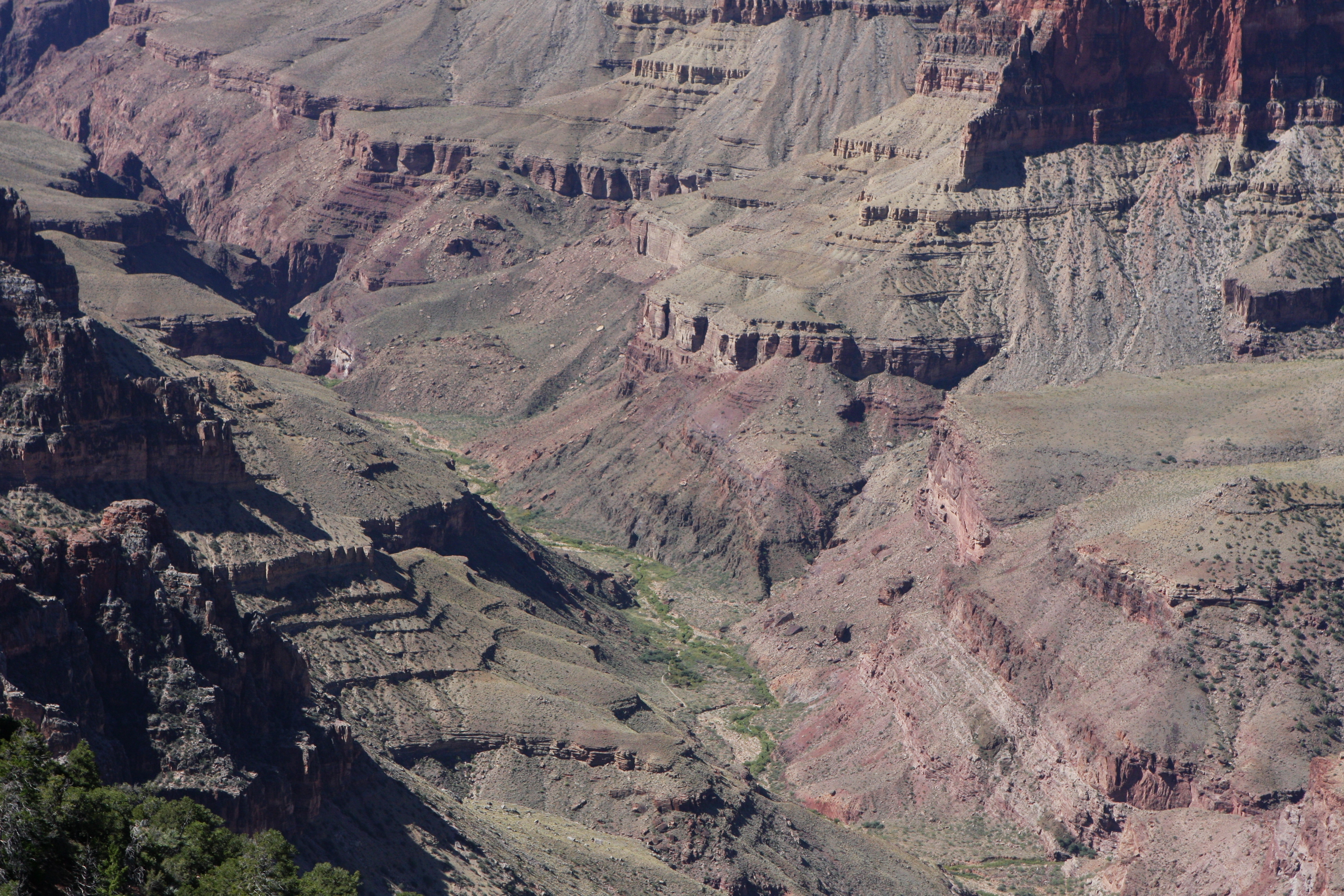 gc 228